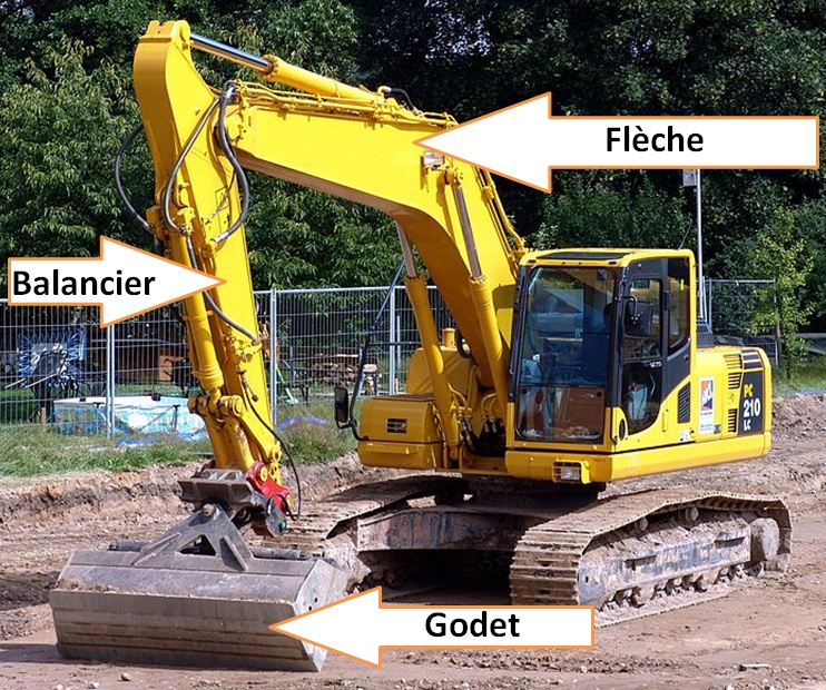 Pelle mécanique hydraulique